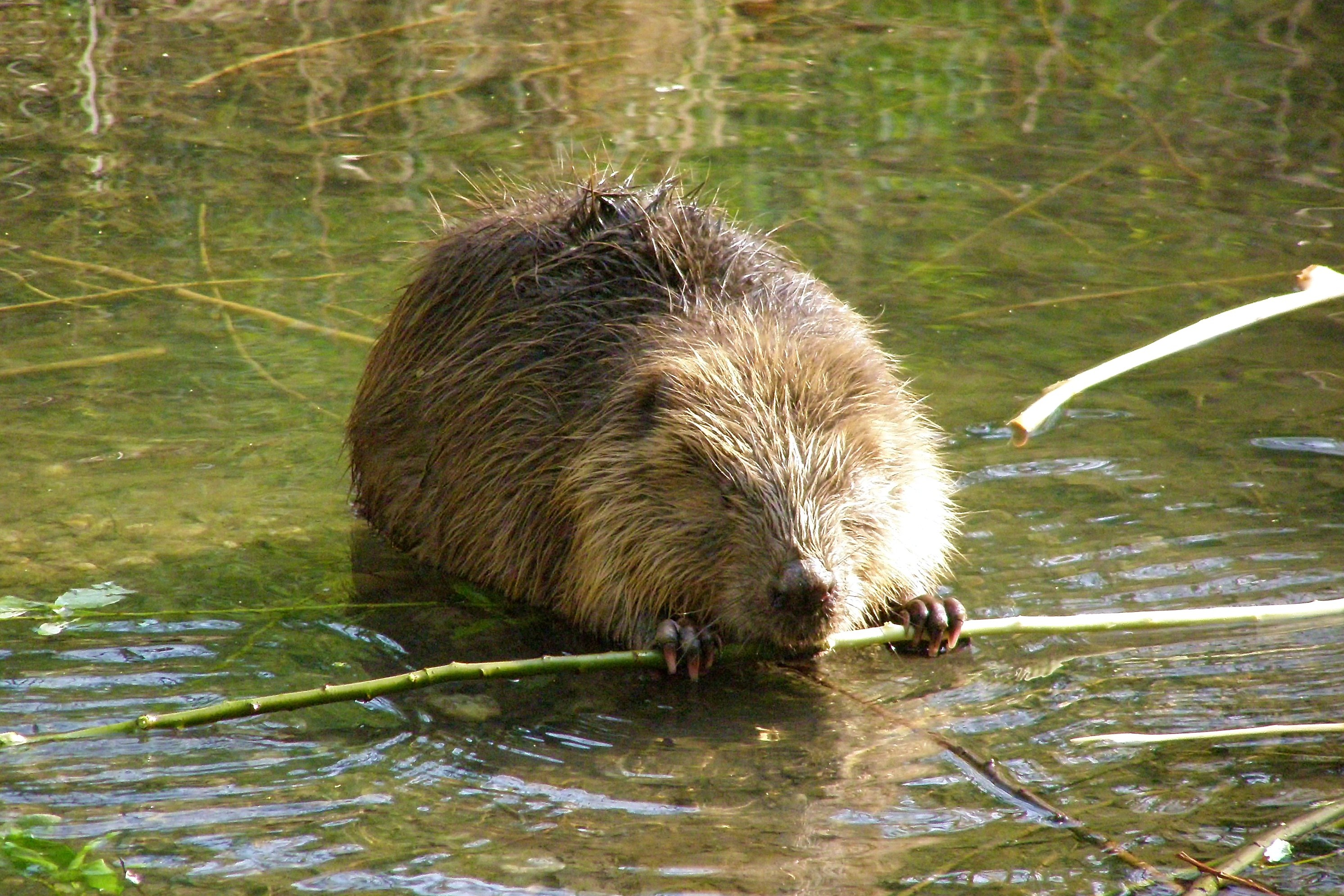 Biber (Castor fiber) in der Lobau in Wien